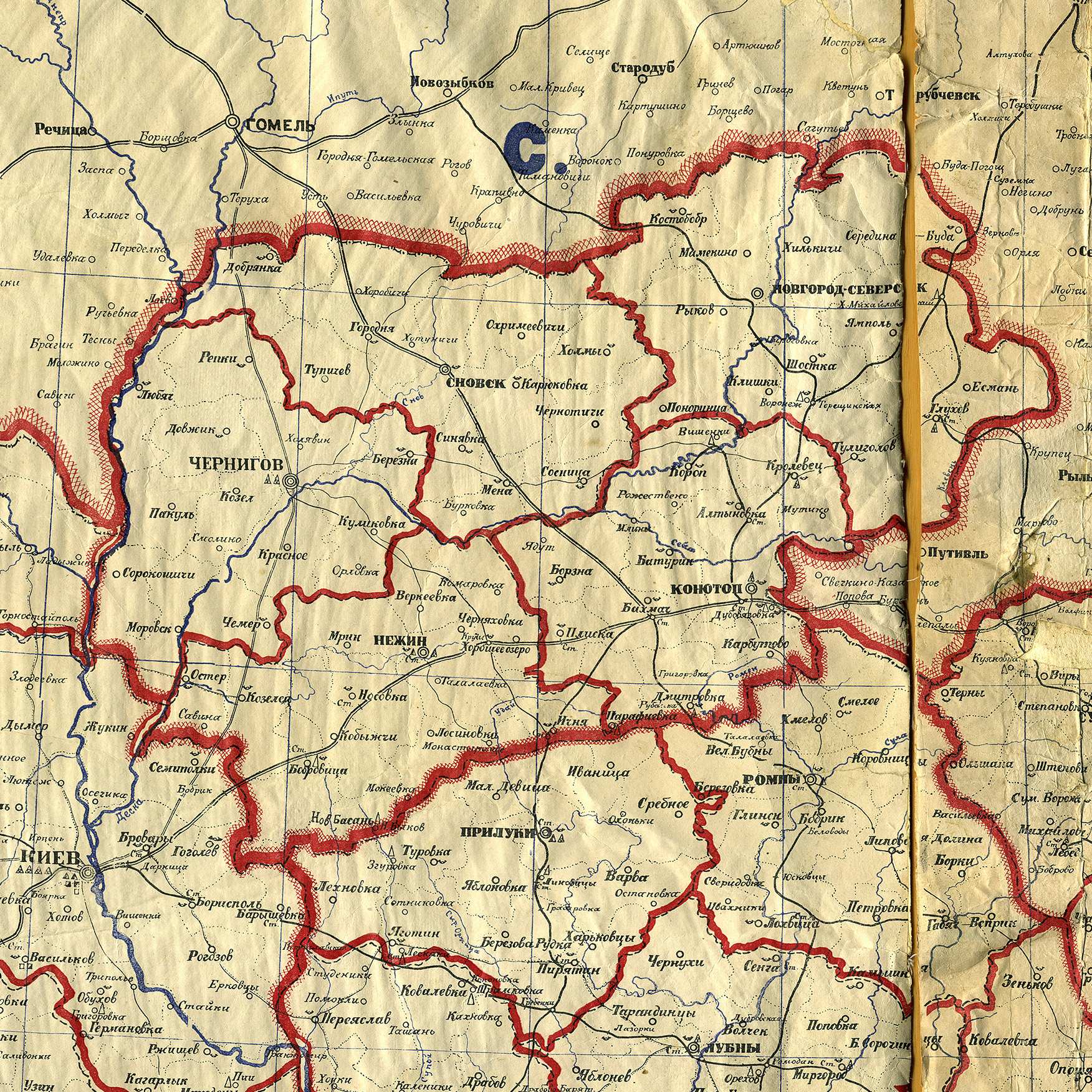 Чернігівська губернія, фрагмент мапи Української соц. рад. республіки, адміністративний поділ після 12 квітня 1923 року